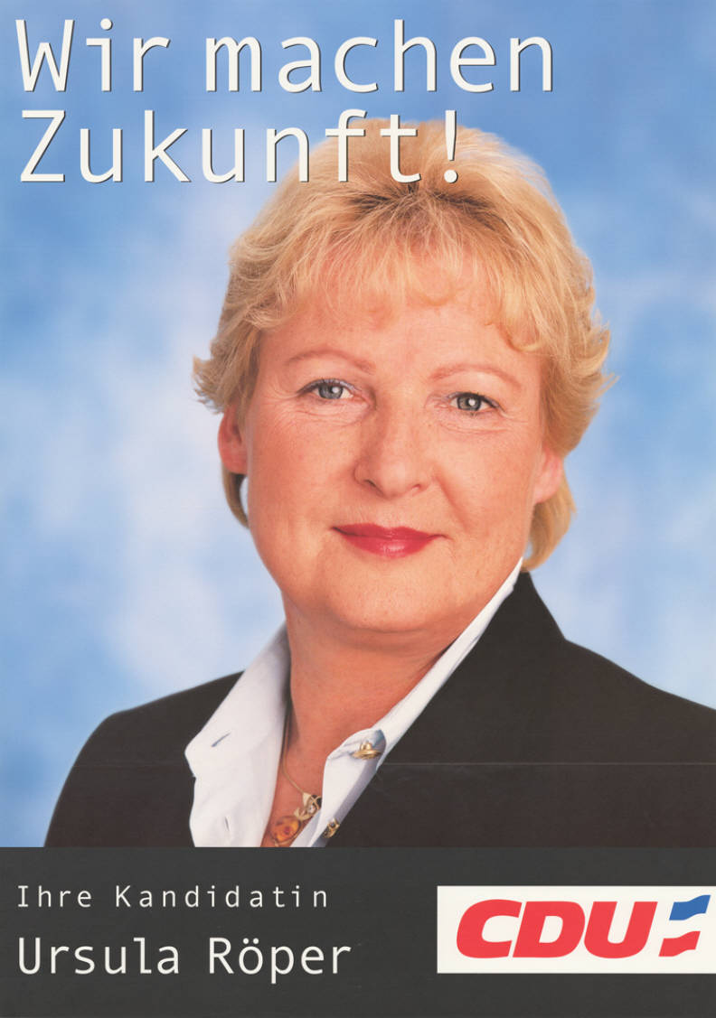 Wir machen Zukunft! Ihre Kandidatin Ursula Röper CDUAbbildung:PorträtfotoPlakatart:Kandidaten-/Personenplakat mit PorträtObjekt-Signatur:10-012 : 1229Bestand:Landtagswahlplakate Schleswig-Holstein (10-012)GliederungBestand10-18:Landtagswahlplakate Schleswig-Holstein (10-012) » CDULizenz:KAS/ACDP 10-012 : 1229 CC-BY-SA 3.0 DE